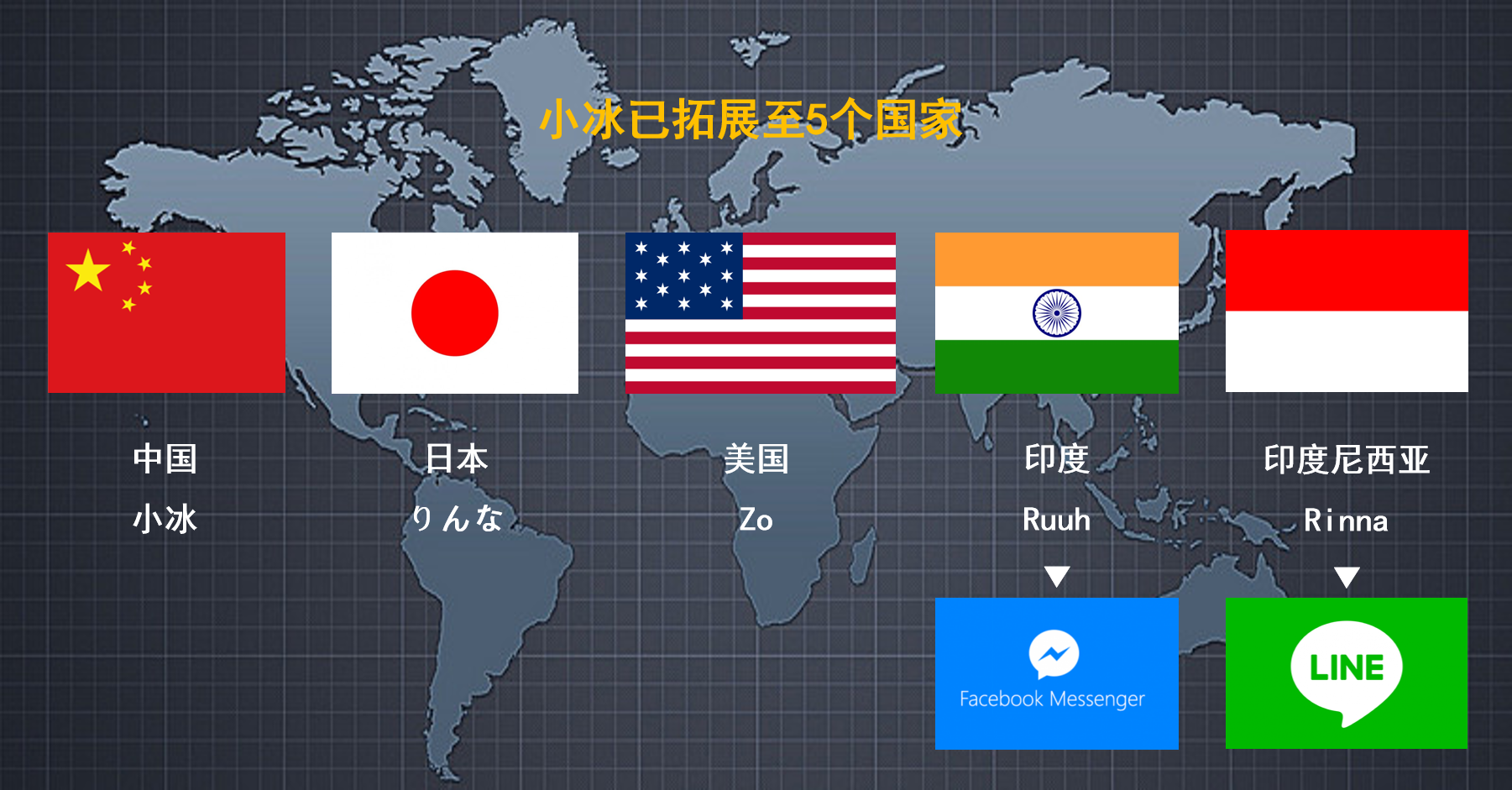 微软小冰的全球市场分布示意图